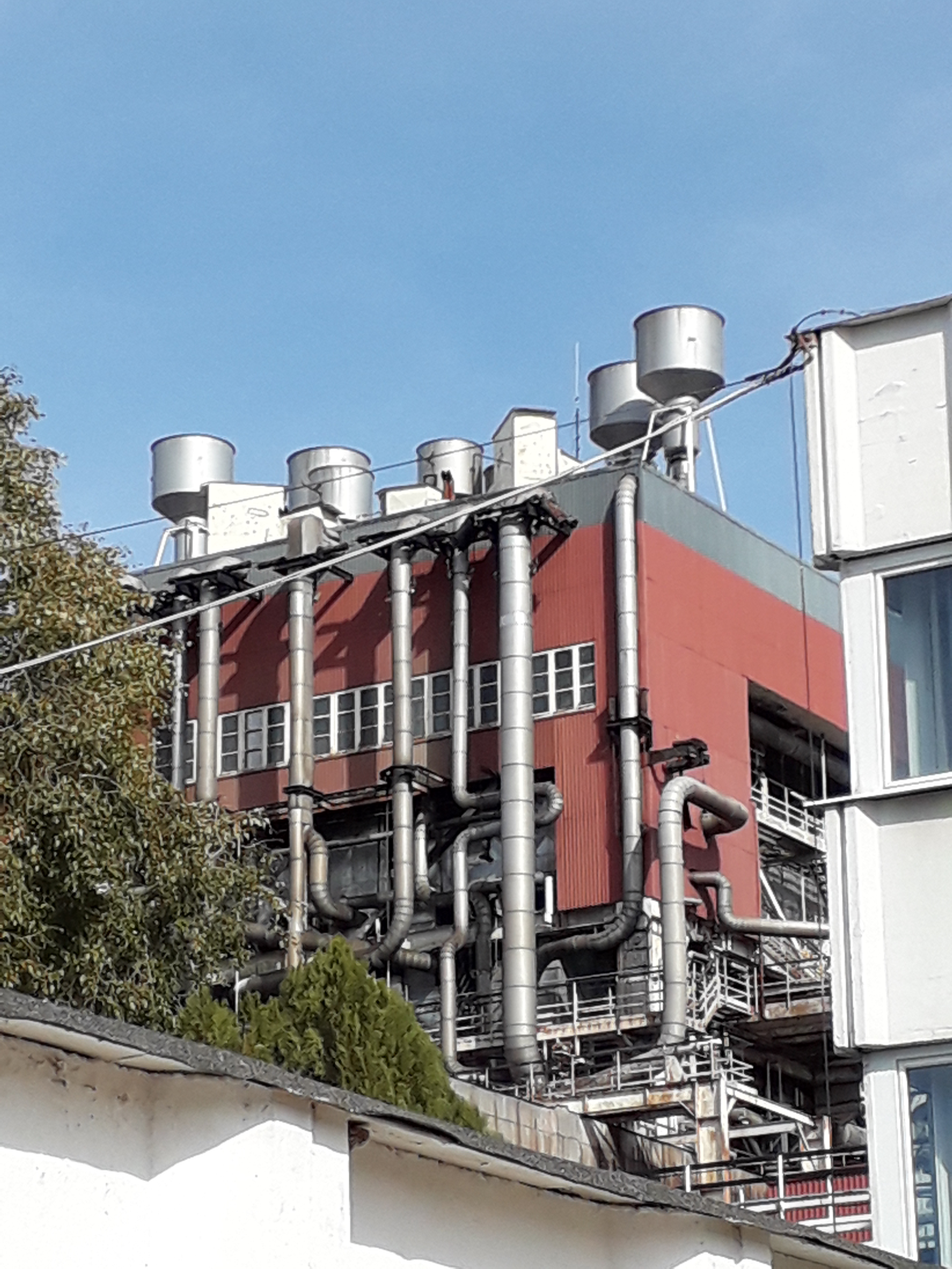 A I. számú blokk közelebről 2019.10.12-én